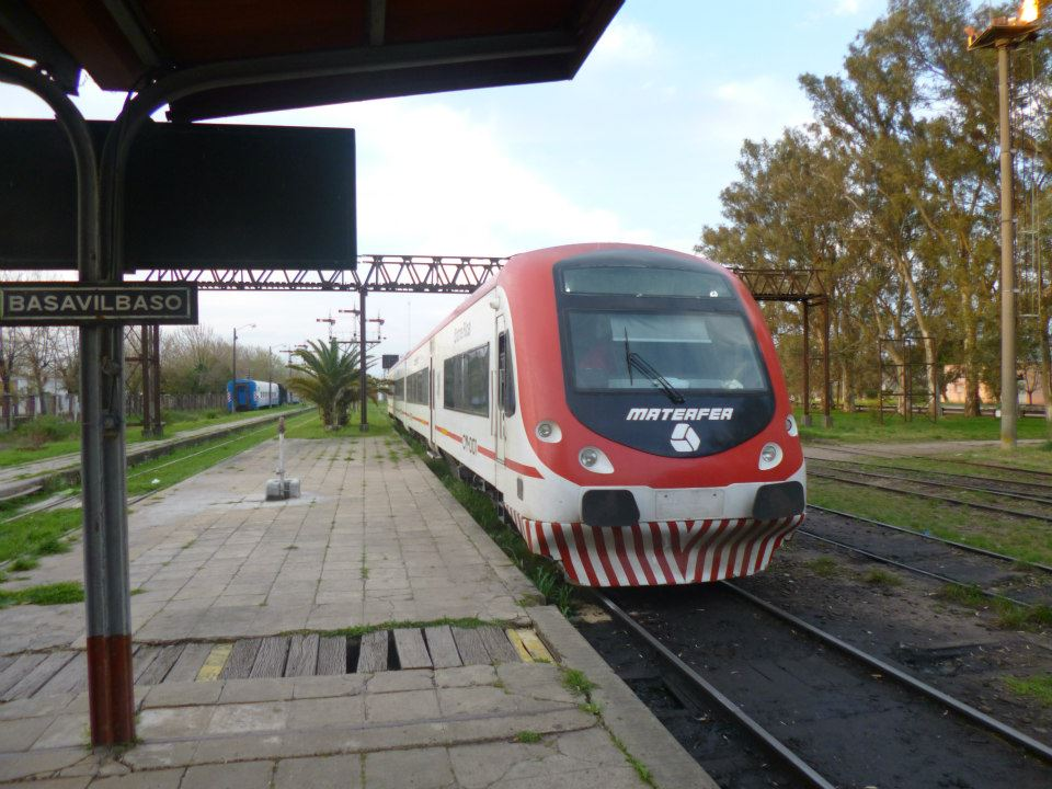 Coche motor Materfer de fabricación Nacional en Entre Ríos.